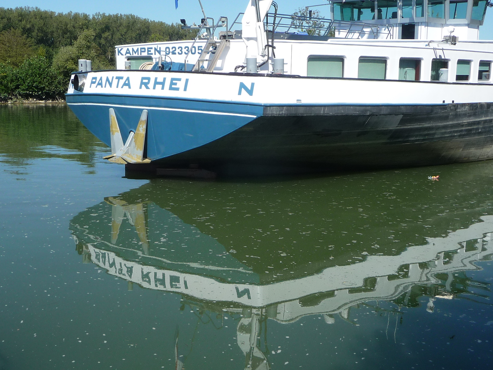 Altlußheim ist eine Gemeinde in Baden-Württemberg und gehört zum Rhein-Neckar-Kreis.